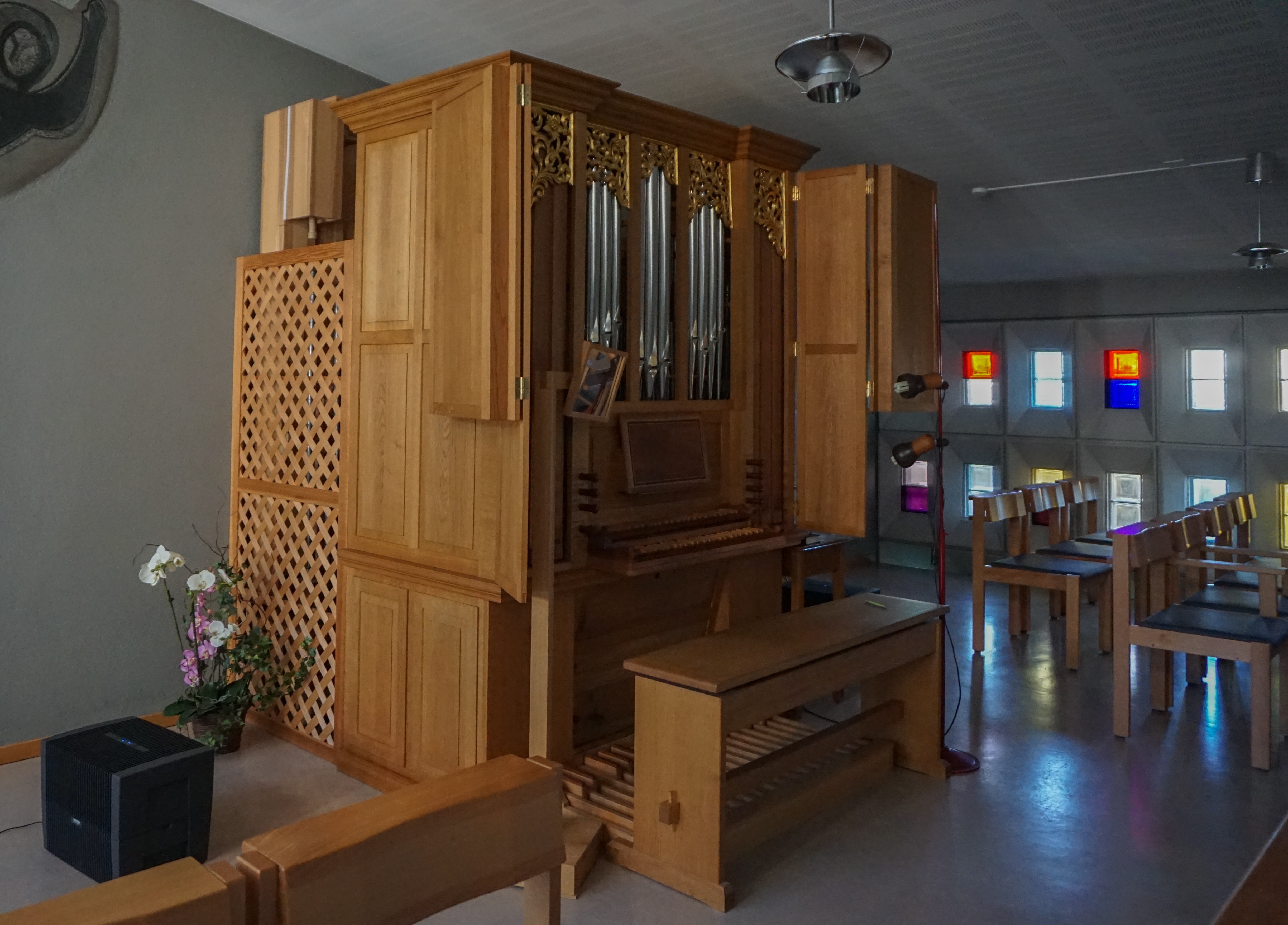 Orgel der Viktoriaspitalkapelle